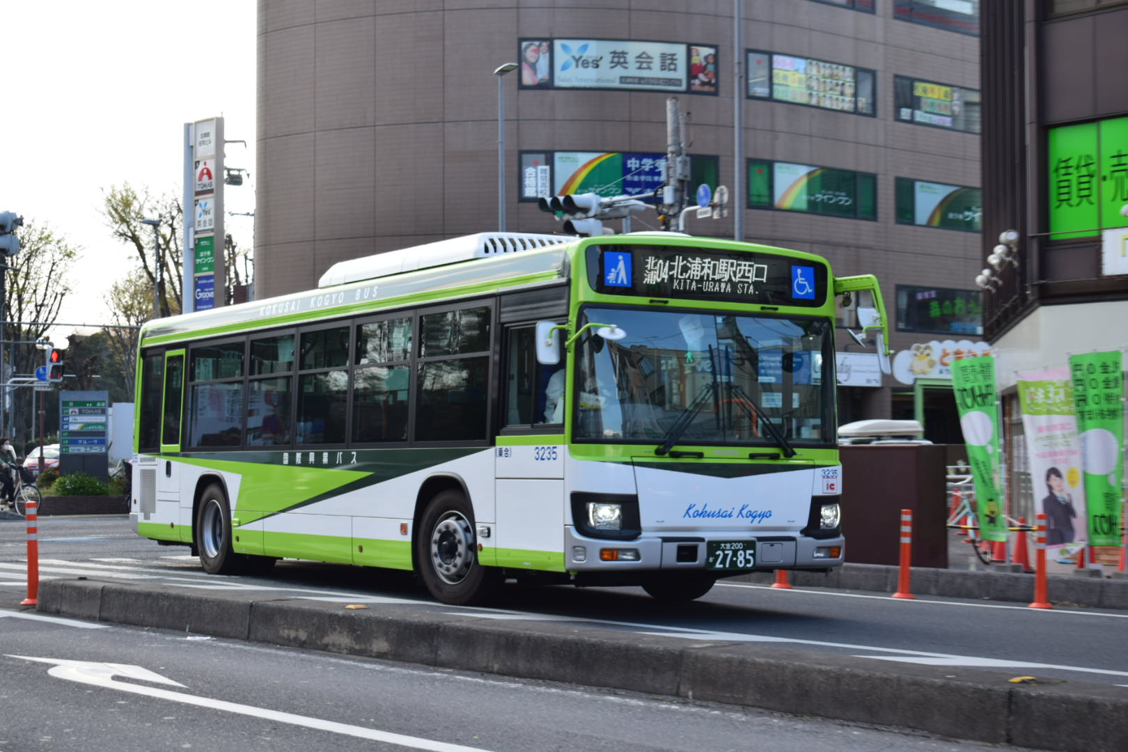 北浦和駅前にて国際興業バス西浦和営業所所属3235号車